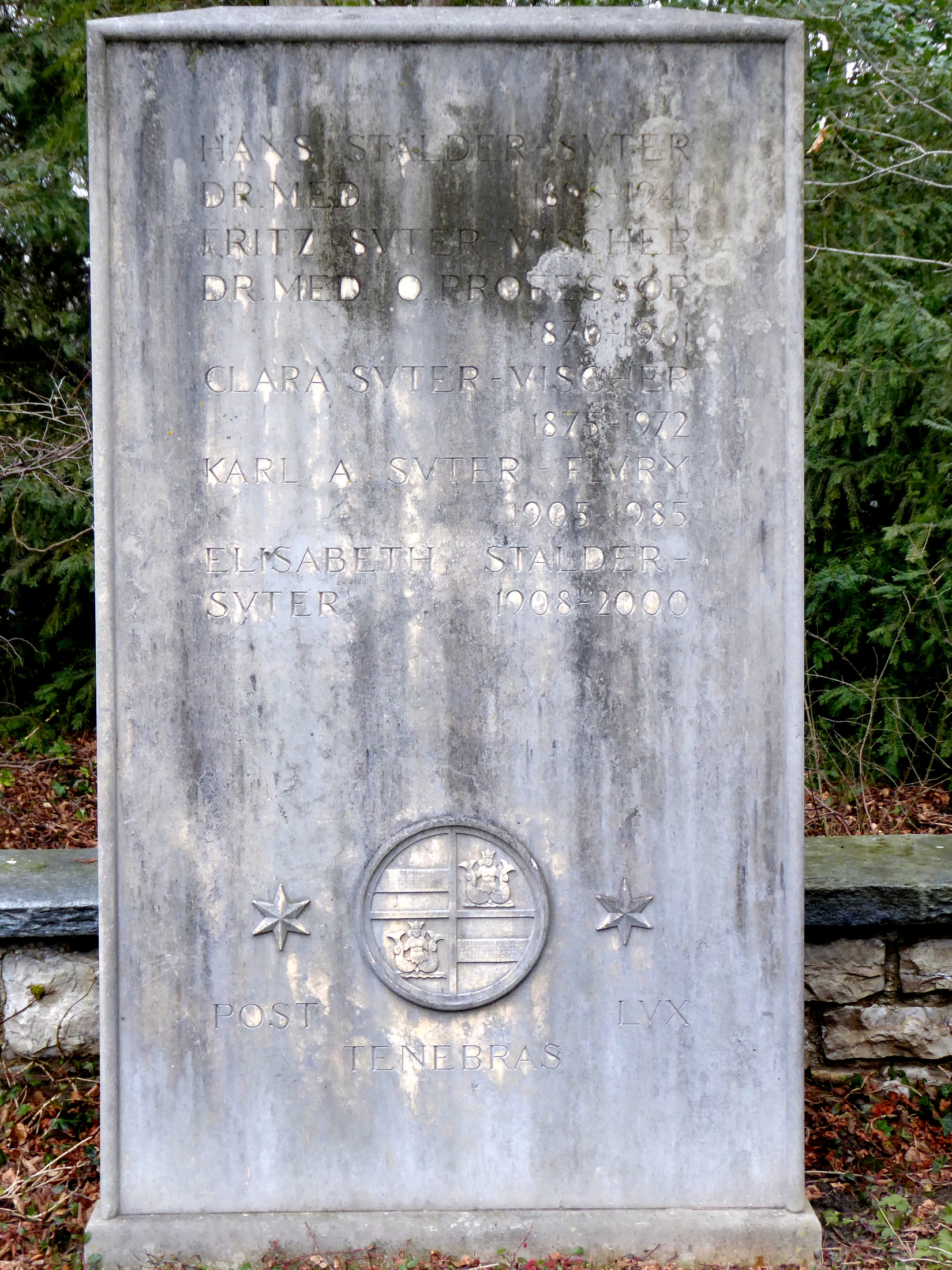 Fritz Suter-Vischer (1870-1961) Familiengrab. Friedhof am Hörnli, Riehen